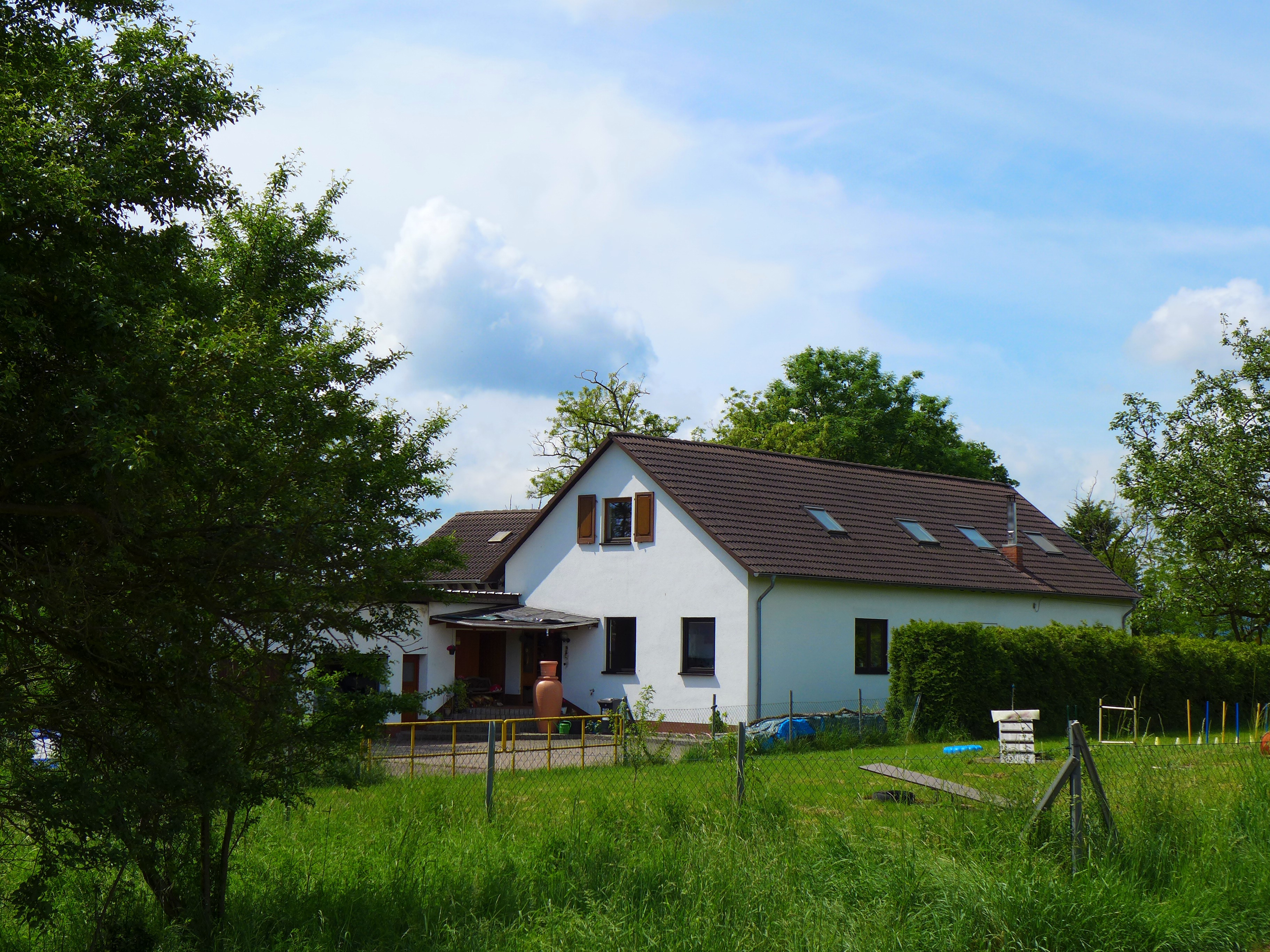 St. Josef und St. Wendelin (Diefflen), zum Wohnhaus umgebautes ehemaliges Jugendheim auf der Zipp